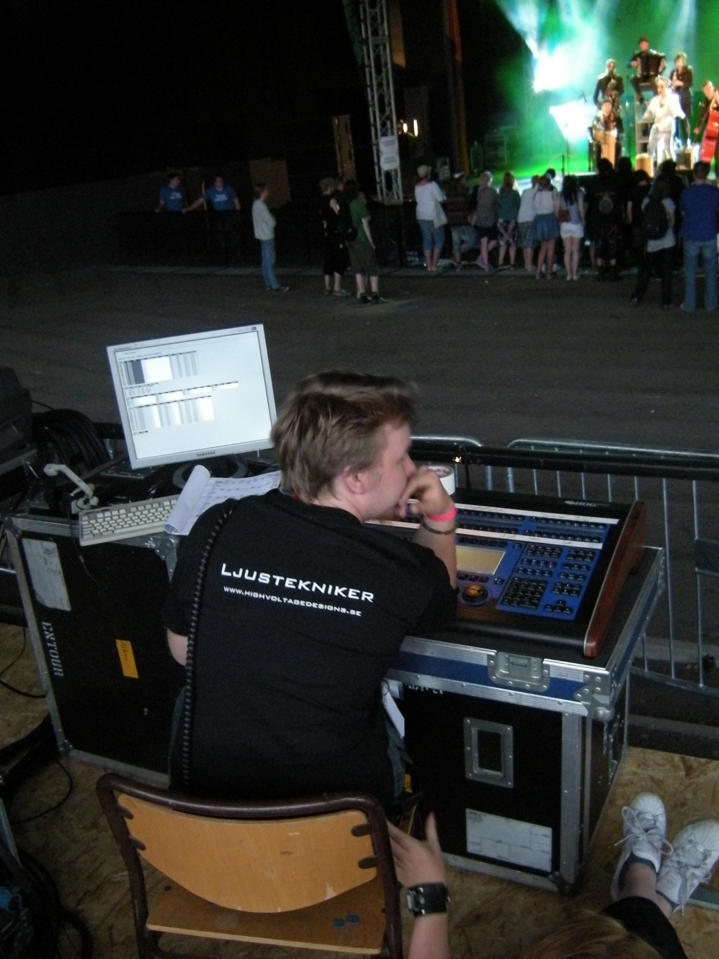 Lustekniker, Peace and Love, Borlänge